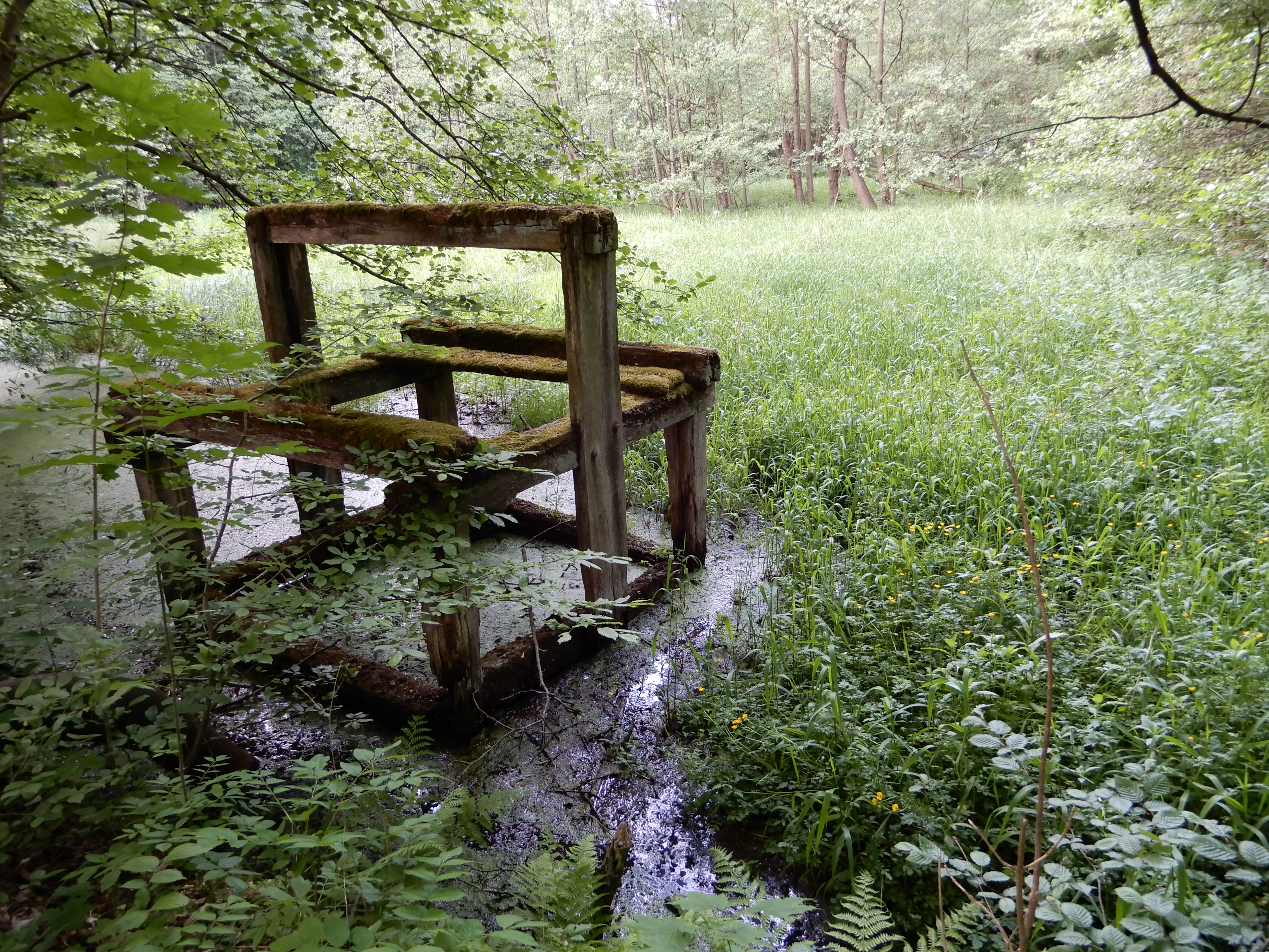 Kirchteich Mägdesprung